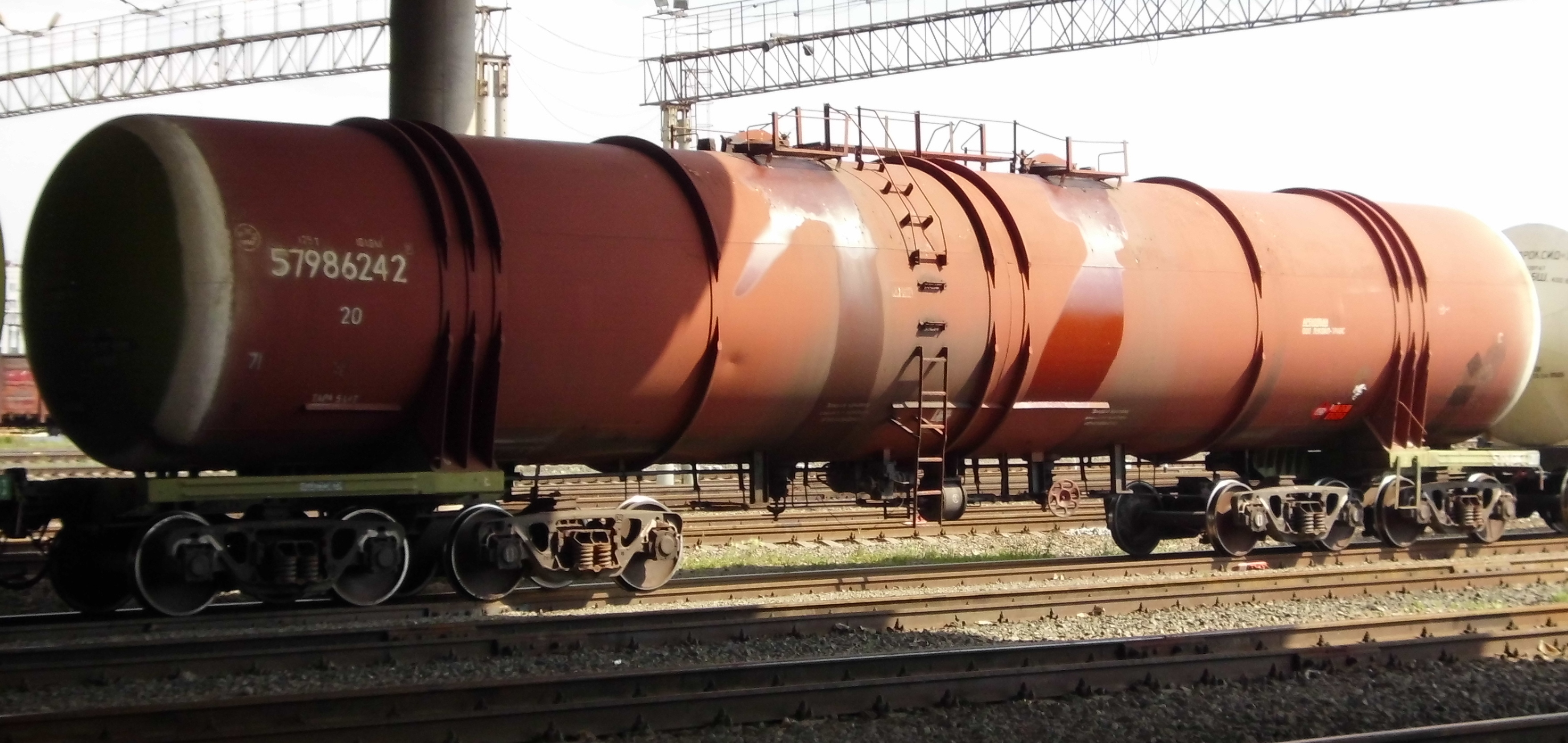 8-ми осный вагон-цистерна для нефти и светлых нефтепродуктов (бензин, керосин, дизельное топливо и т.д.). Россия.